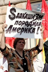 12 August 2008. Meeting against Saakashvili and USA near the U.S. embassy in Moscow. (Митинг против Саакашвили и США у американского посольства в Москве)